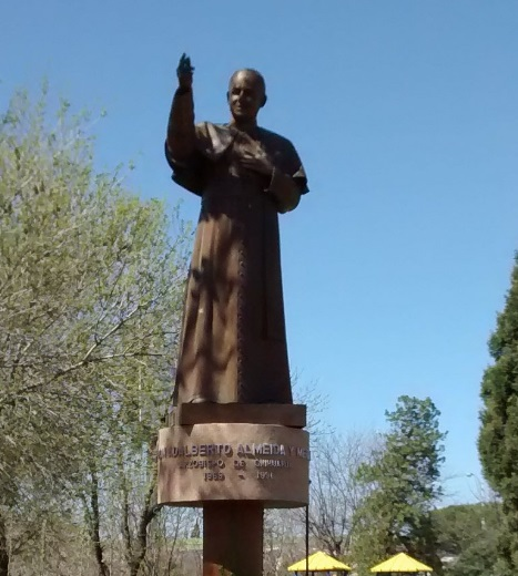 Estatua de Mons. Adalberto Almeida y Merino